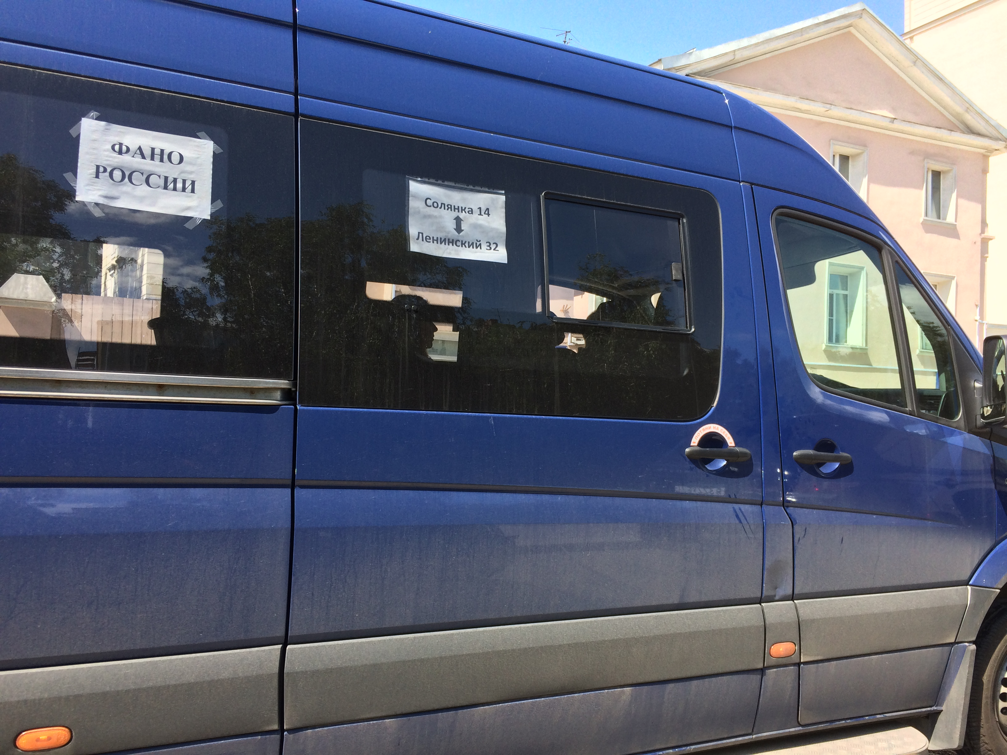 Автобус ФАНО России